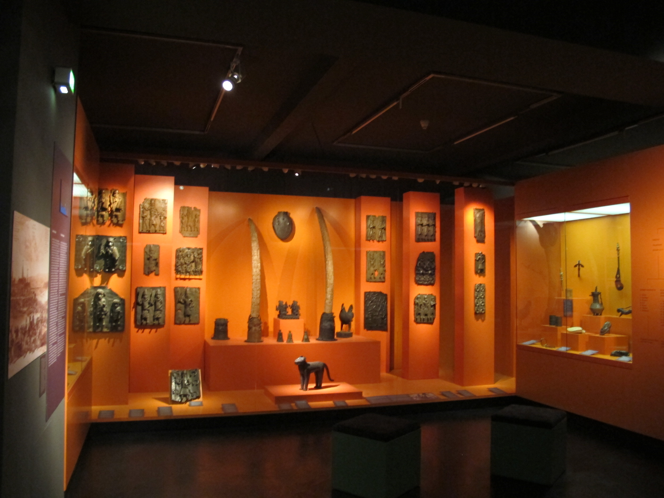 Museum für Völkerkunde zu Leipzig, africa